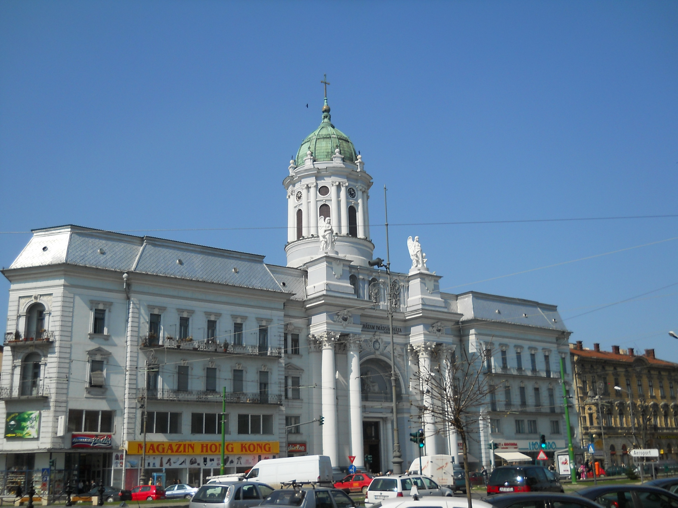 Vedere de ansamblu a catedralei